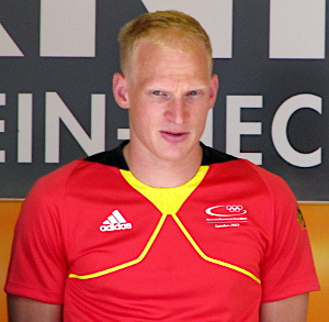 Steffen Gebhardt beim Empfang der Olympia-Teilnehmer des Teams London der Metropolregion Rhein-Neckar 2012.